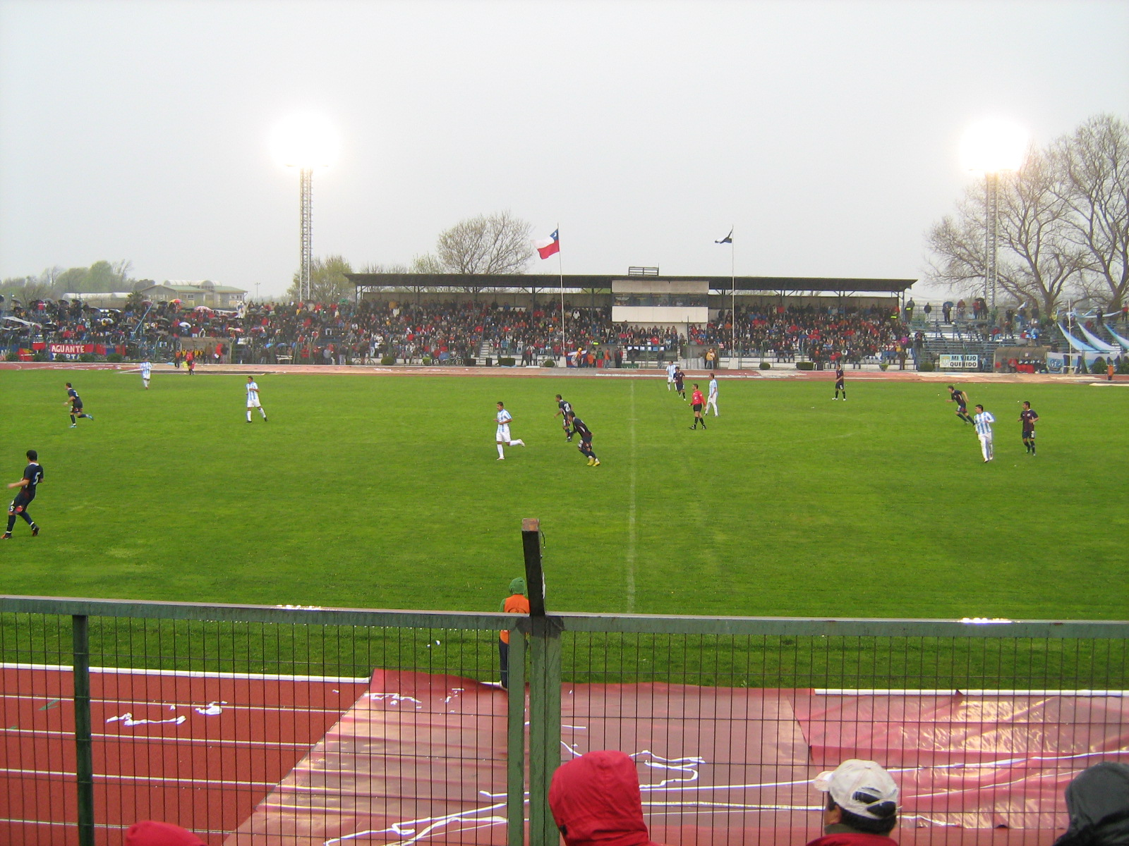 Iberia v/s Magallanes